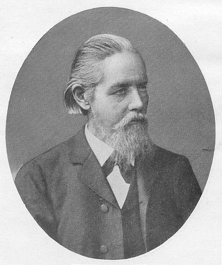 Friedrich Blass (1843–1907), deutscher klassischer Philologe. Originalfotografie von Fritz Möller (1860–1923), Halle. Aus dem Besitz von Georg Wissowa.